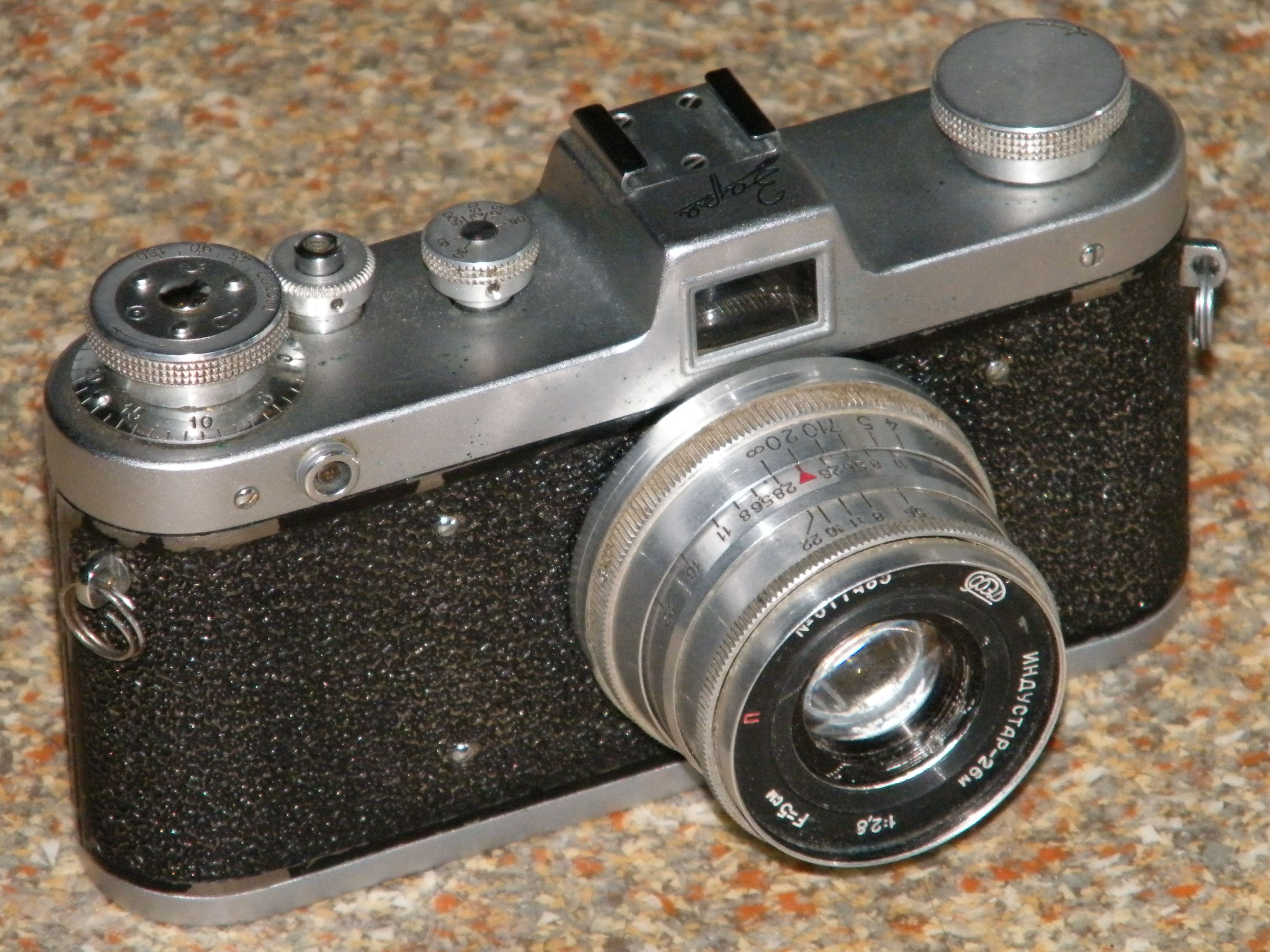 Фотоаппарат "Заря", завод ФЭД.